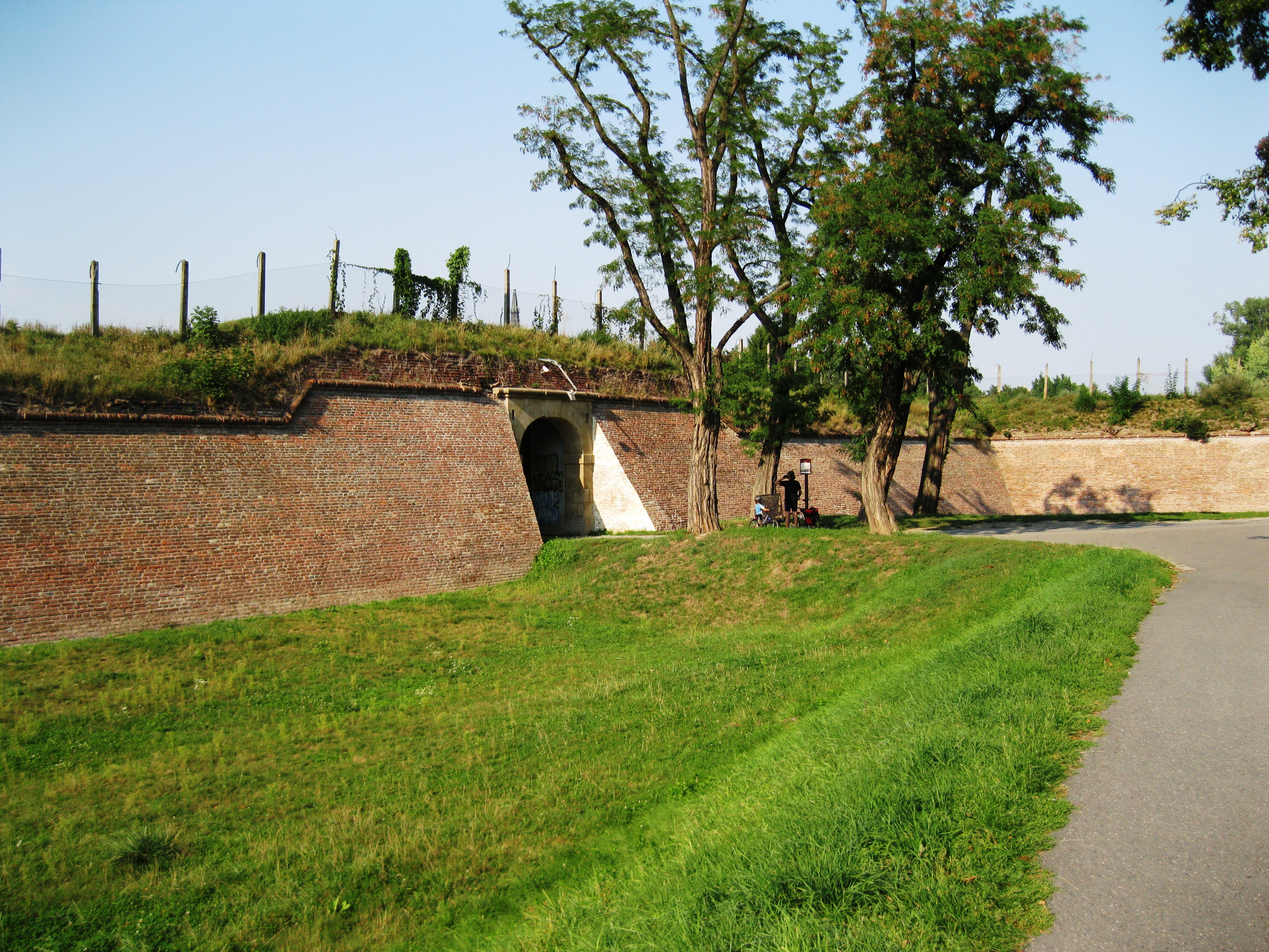 Pevnost Korunní (Olomouc), Bezručovy sady, Olomouc